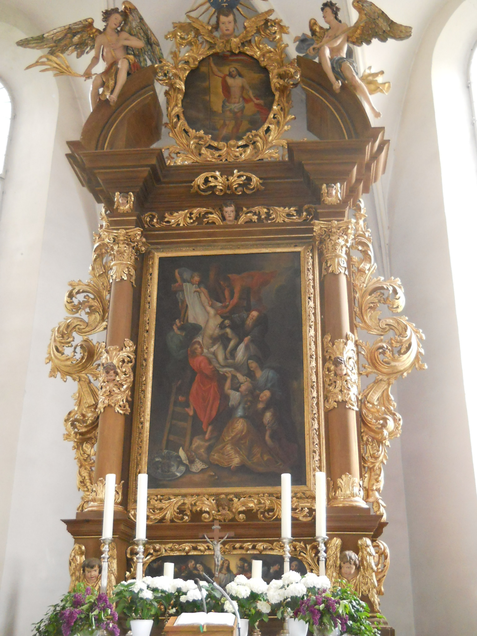 Dittenheim, Gemeinde im mittelfränkischen Landkreis Weißenburg-Gunzenhausen (Bayern), evang.-luth. Pfarrkirche St. Peter und Paul, Altar mit Rubens-Kopie "Kreuzabnahme Jesu"